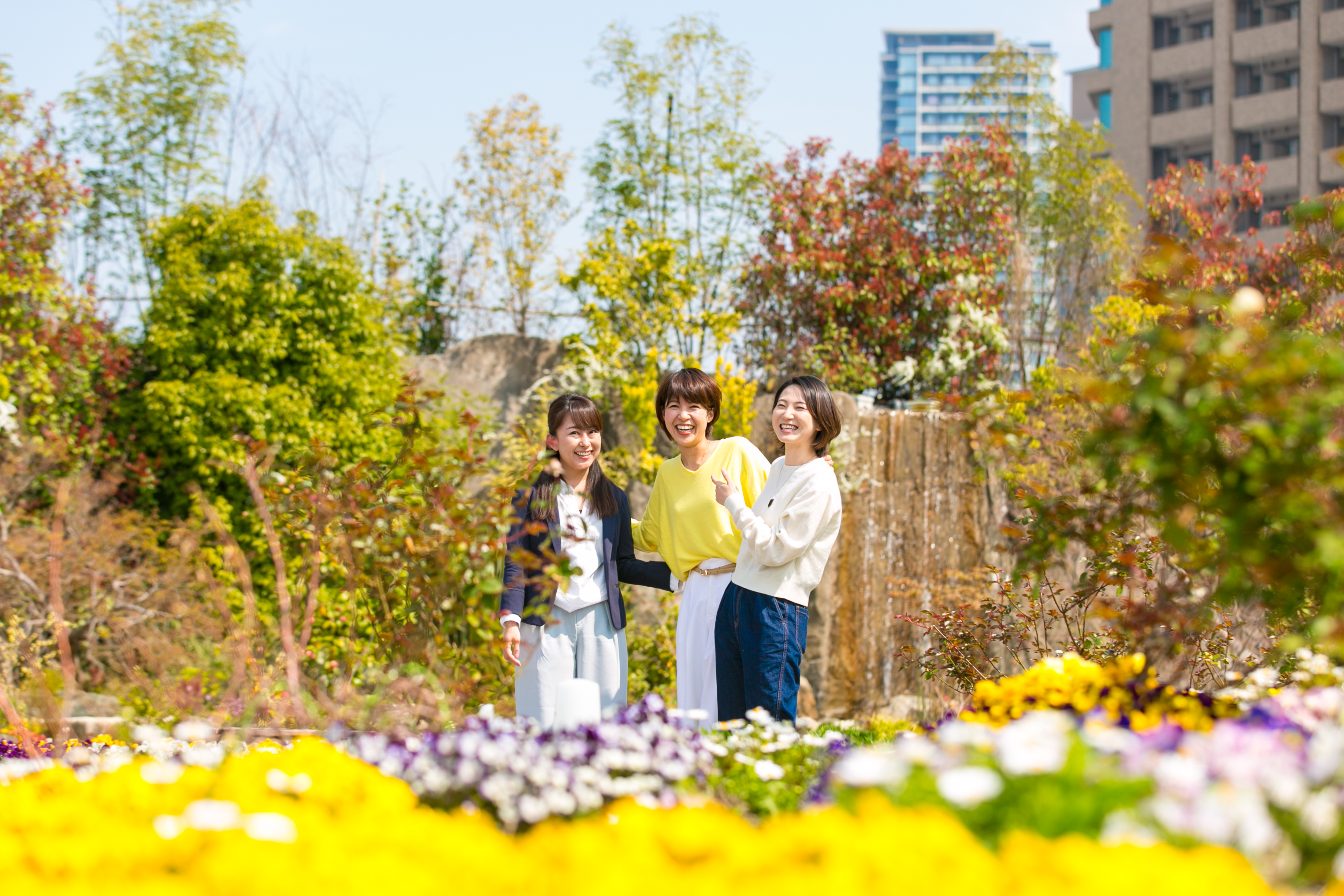 うめきた UMEDAIガーデン内写真